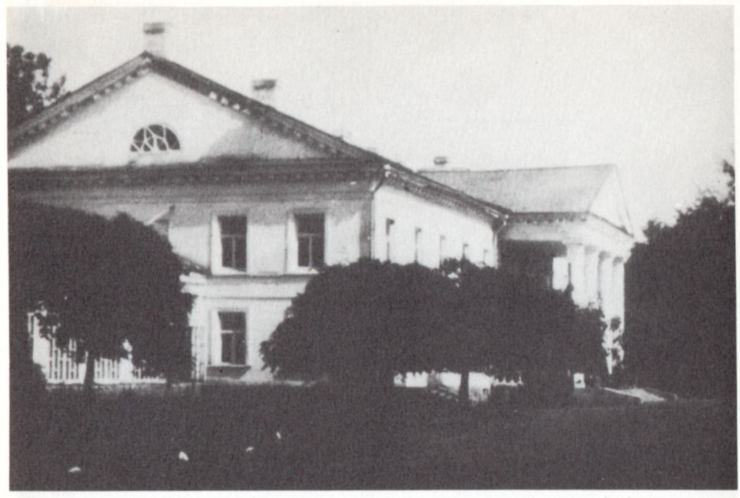 Беларуская (тарашкевіца): Дукора (Dukora), сядзіба Ашторпаў (Aštorp) і Гартынгаў (Harting)